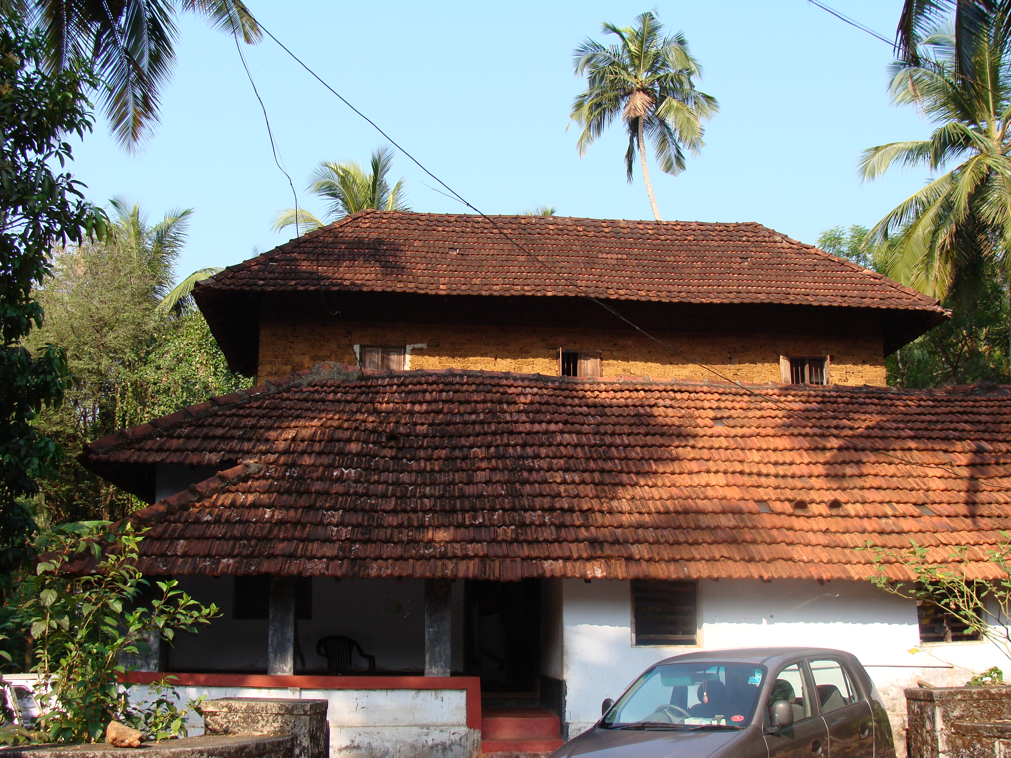 Panjal Thottam Tharavatu Pic taken Sreedharan Namboothoiri Venue Thottathil Mana Time & Date 22/02/2008 9.11 PM